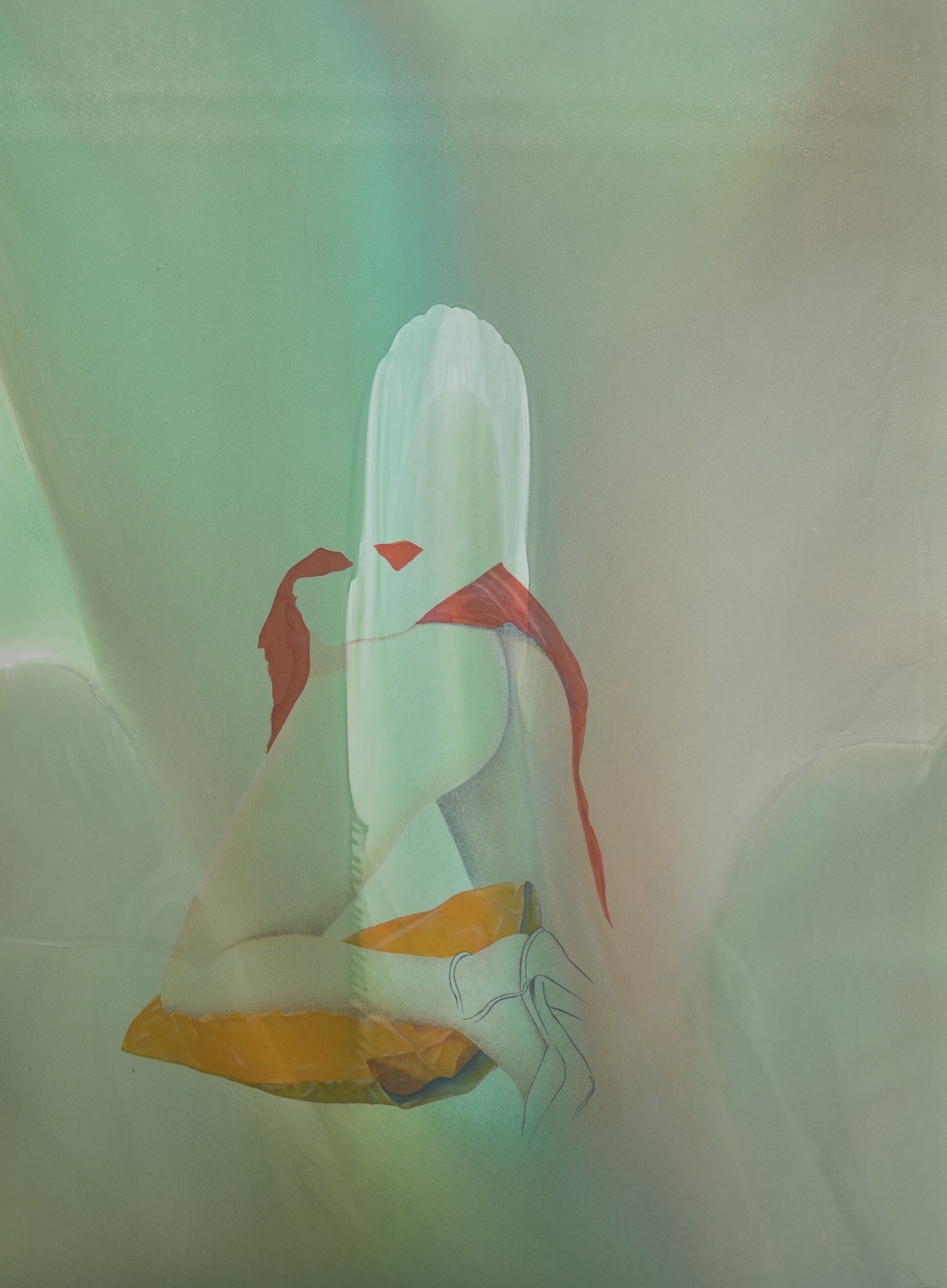 Ebrahim Ehrari, Ohne Titel, 1985, Öl, Auqarell und Bleistift auf Papier, 80x60cm